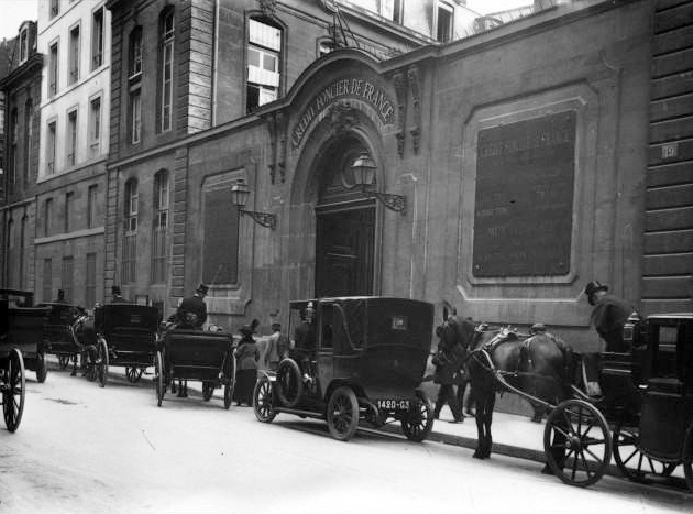 Le siège social du Crédit foncier de France, 19 rue des Capucines, Paris 1er, en 1913.